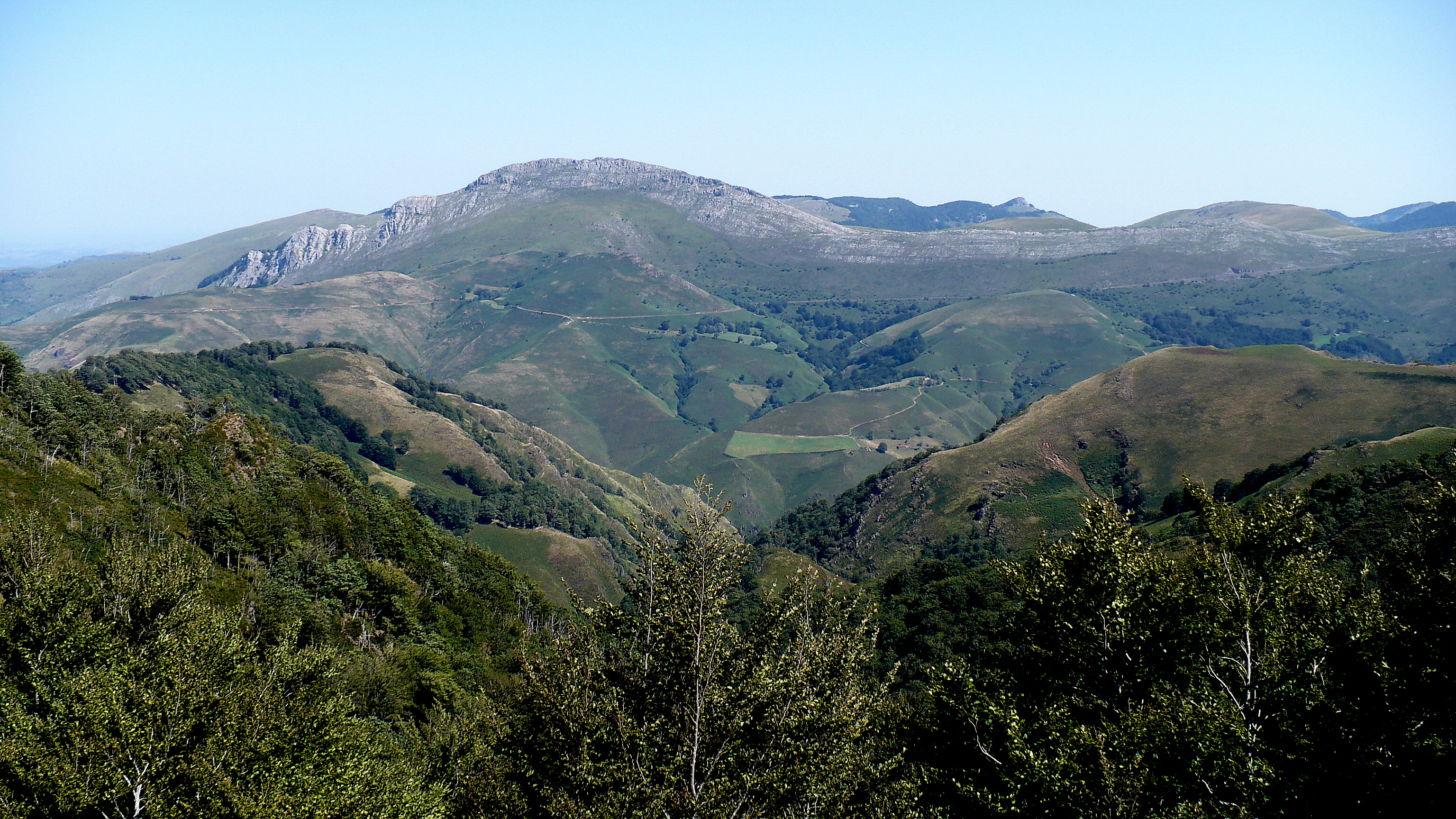 Pic de Béhorléguy